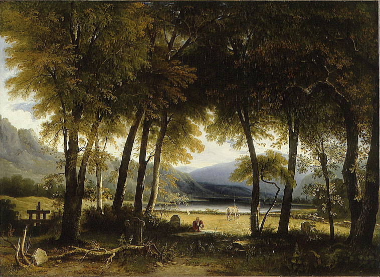 Old Mortality, Paris 1833, Huile sur toile. (Scène tirée de la nouvelle de Walter Scott "Les puritains d'Écosse"). Regnier choisi de représenter le personnage principal, Robert Paterson, un écossais du 18e siècle, qui à la fin de la vie décide de voyager à travers l'Ecosse pour re-graver les tombeaux des martyrs presbythériens de Covenanter au 17e siècle.